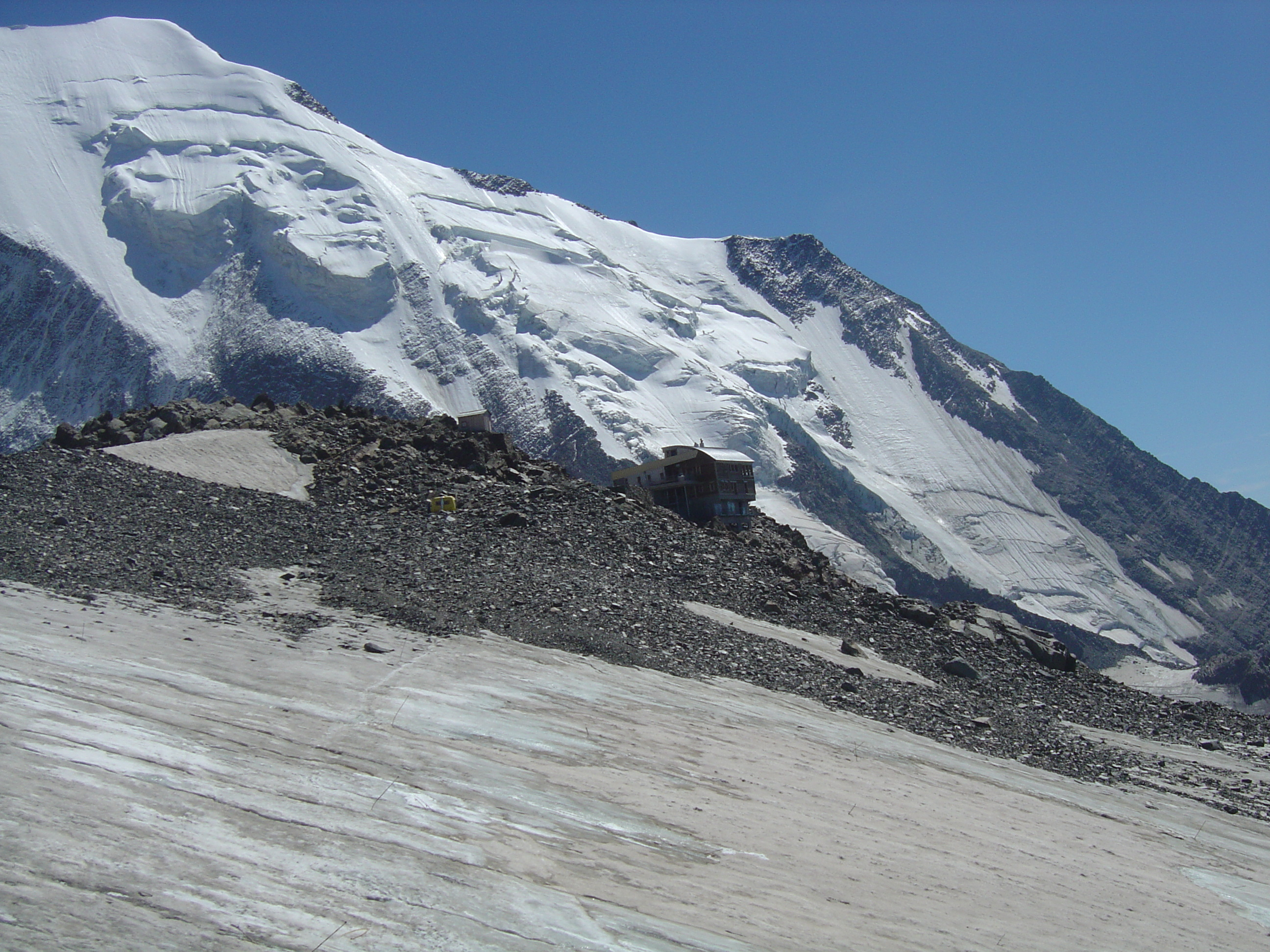 Arrivée au niveau du refuge de Tête Rousse (3167m) où il y a un névé